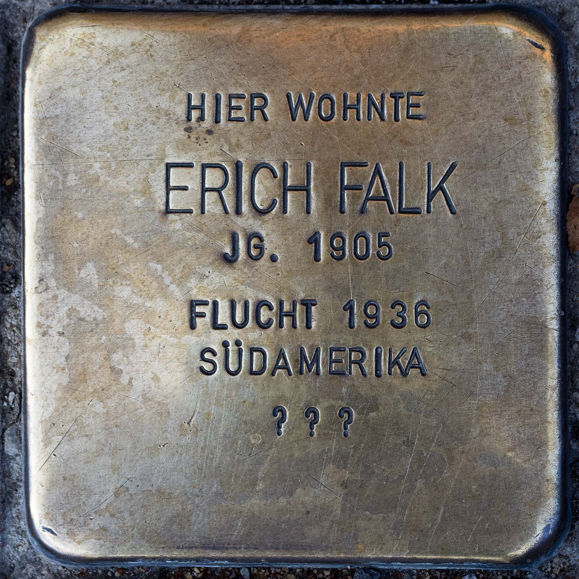 2016 Stolpersteine Toevo Erich Falk